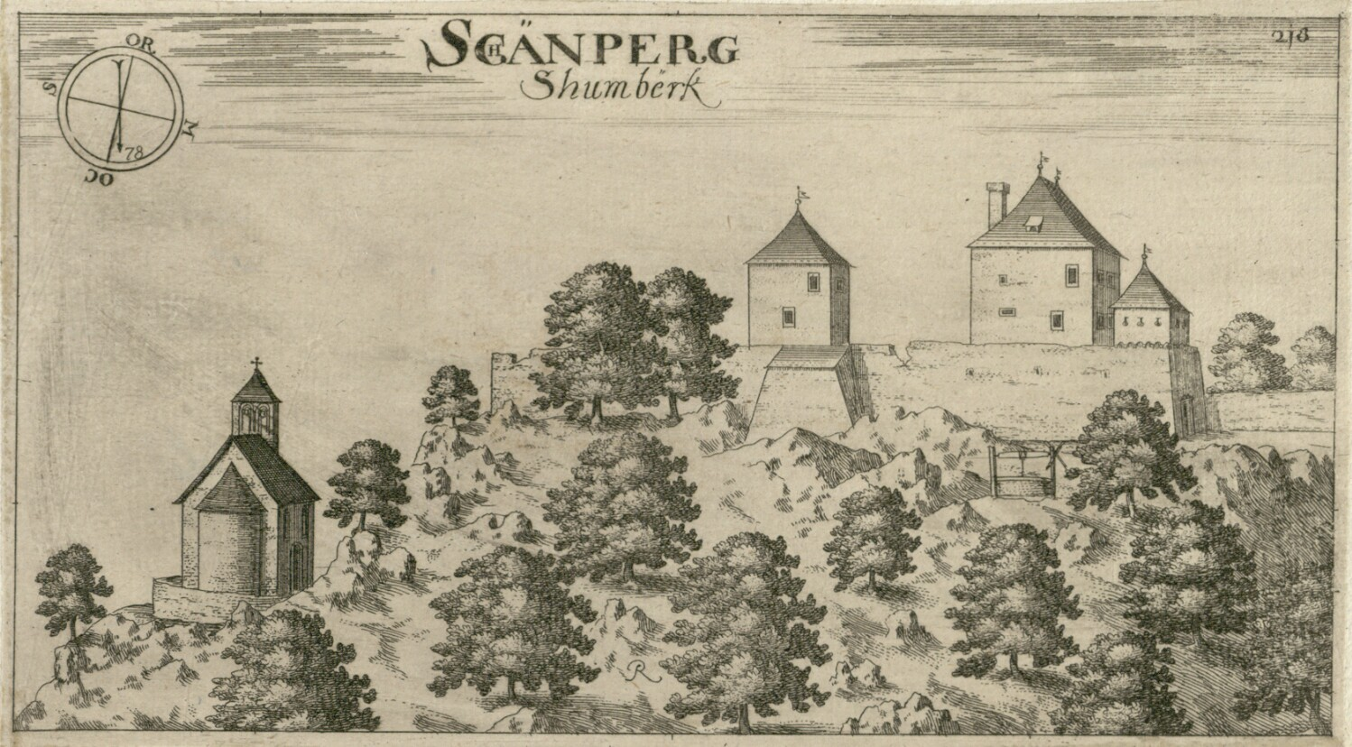 Dvorec Selo